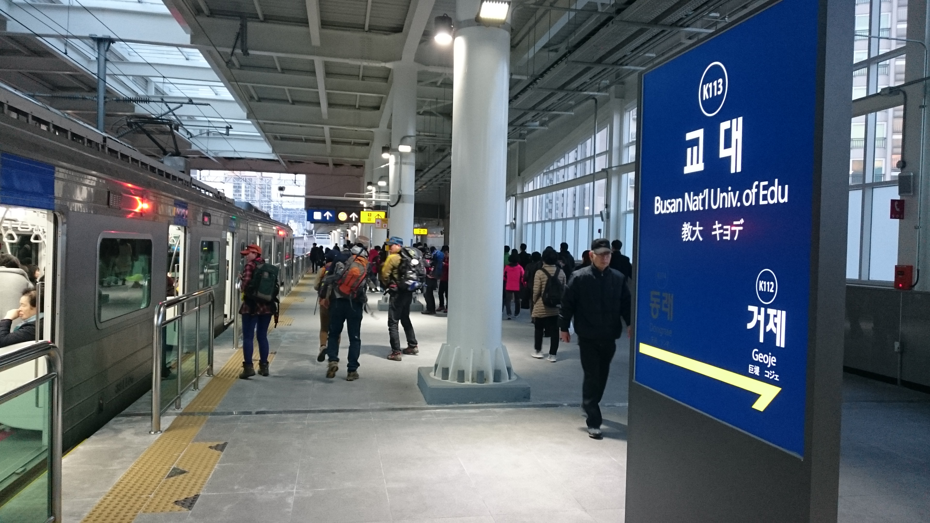 韓国鉄道公社東海線教大駅プラットフォーム。